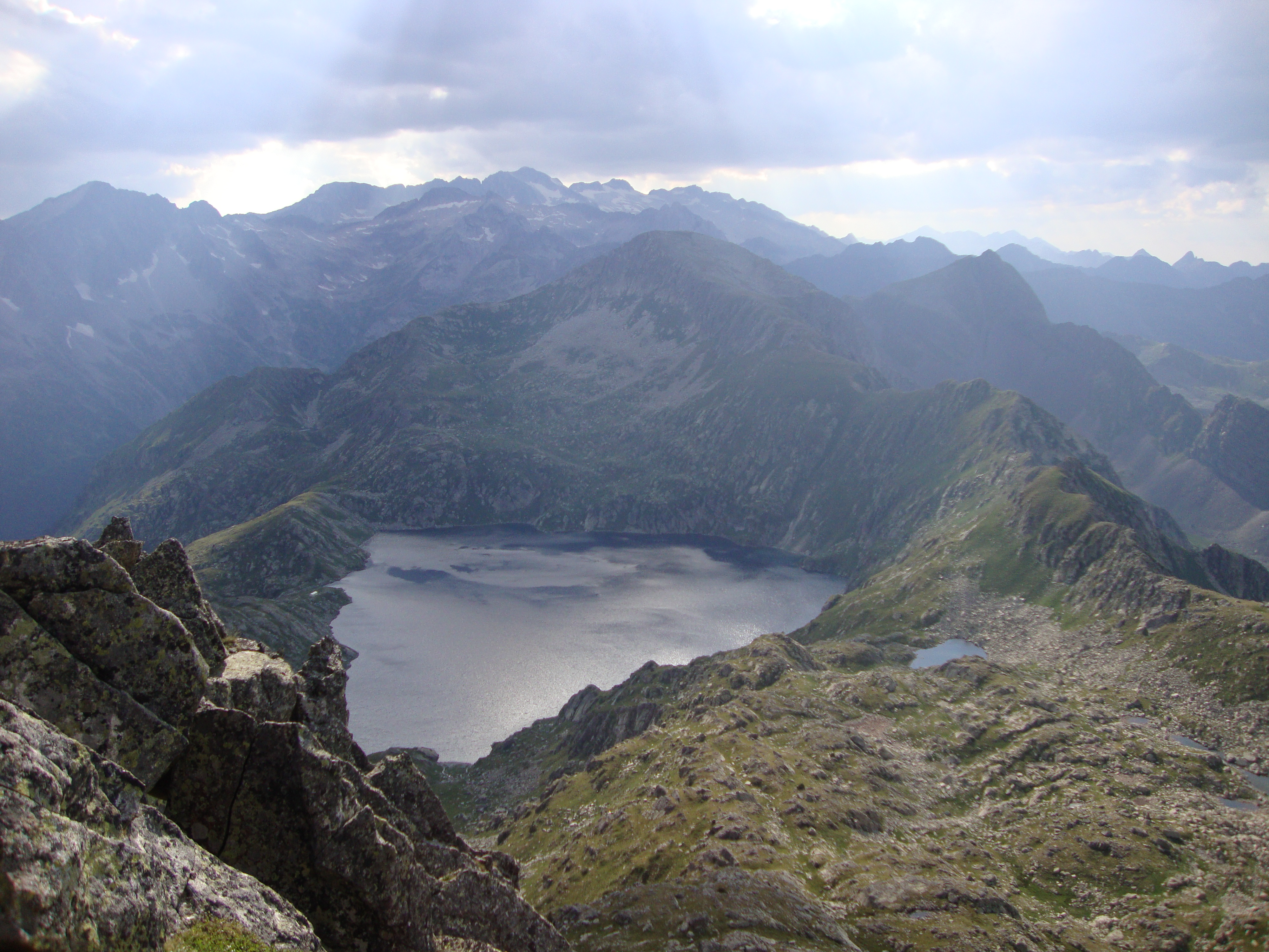 Vista del Lac Redon